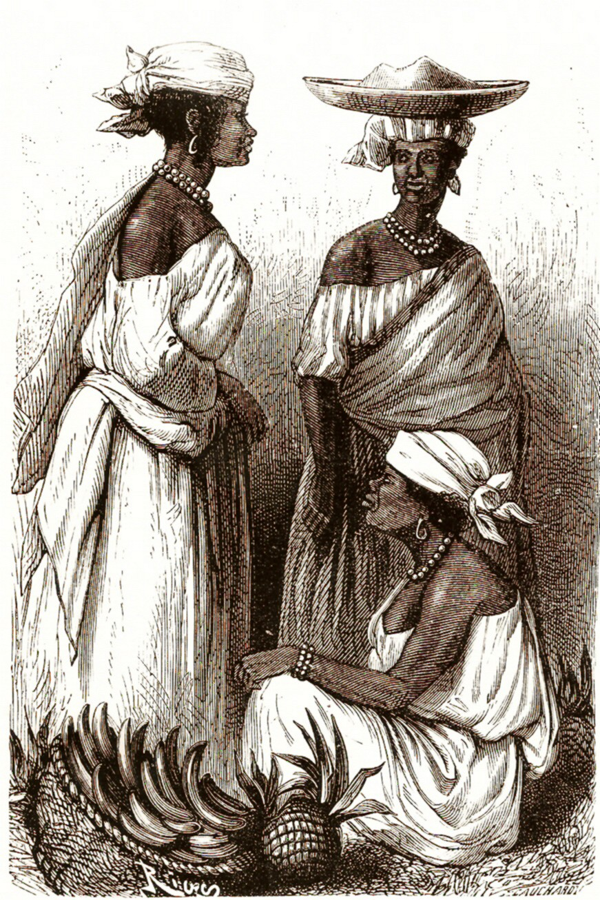 Creoolsen op de markt van Paramaribo. 19de-eeuwse gravure. Eigen scan.